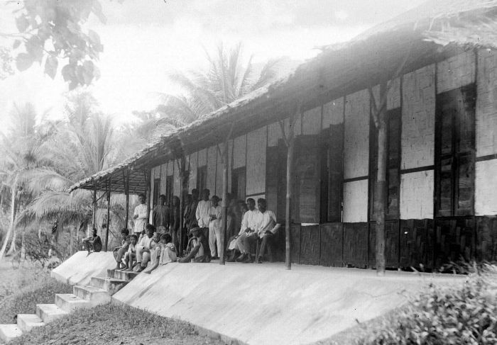 Negatief. Boeroe. Hulpziekenhuis te Leksoela (Zuid Boeroe).